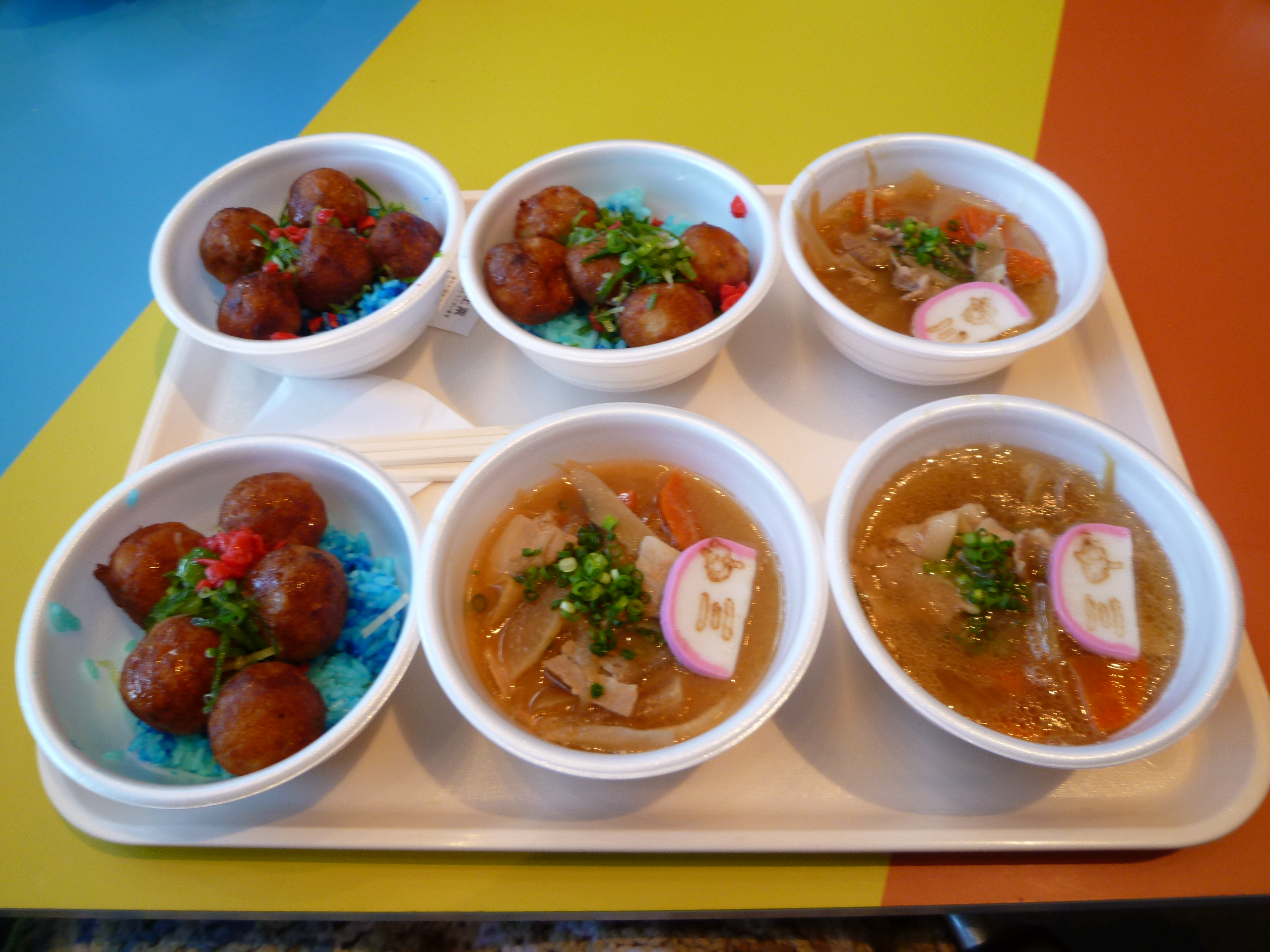 お台場合衆国presents キラキラ WINTER LANDめちゃイケフードコートで販売されていた三中丼